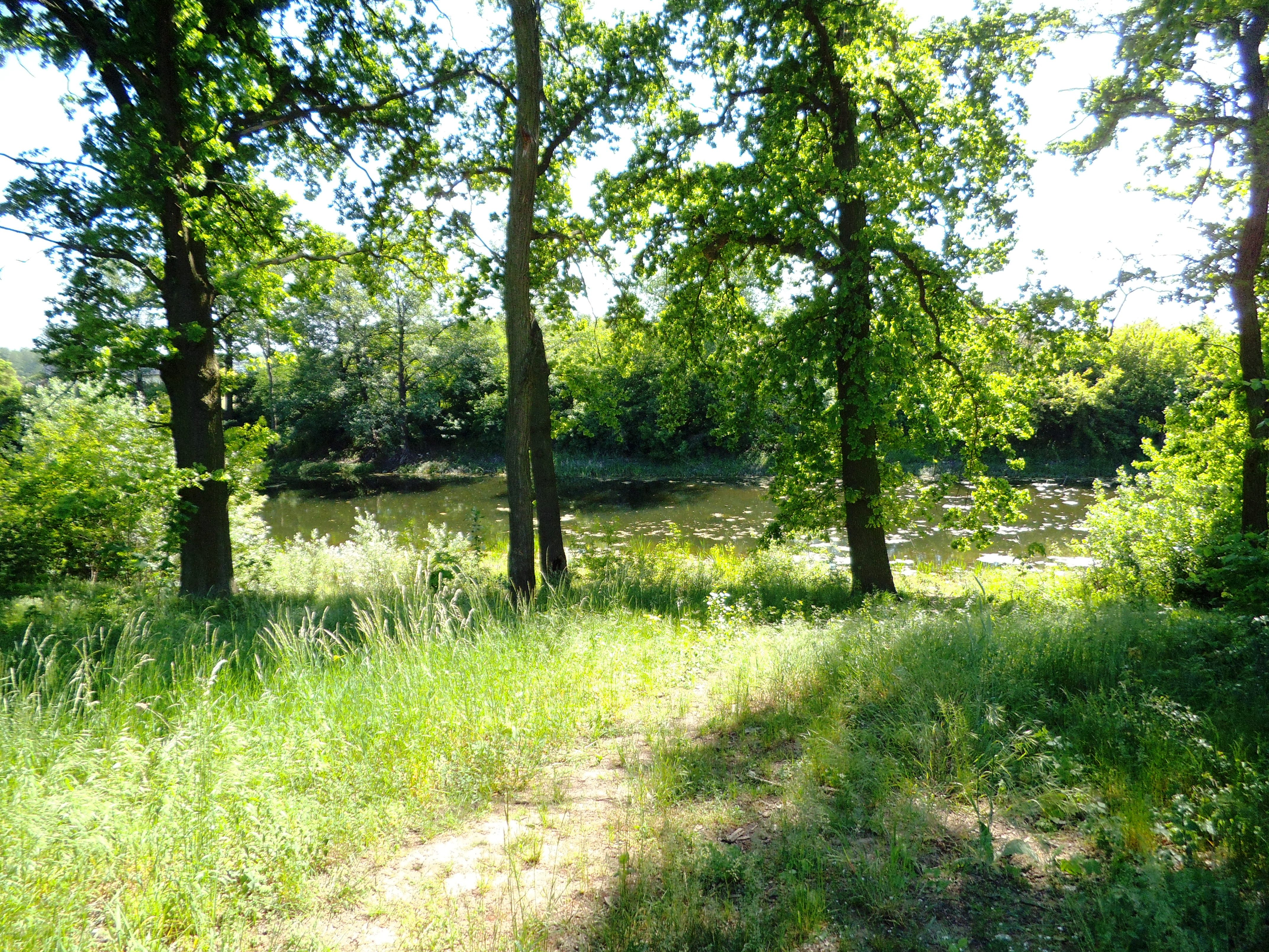 Fosa fortu X Twierdzy Toruń